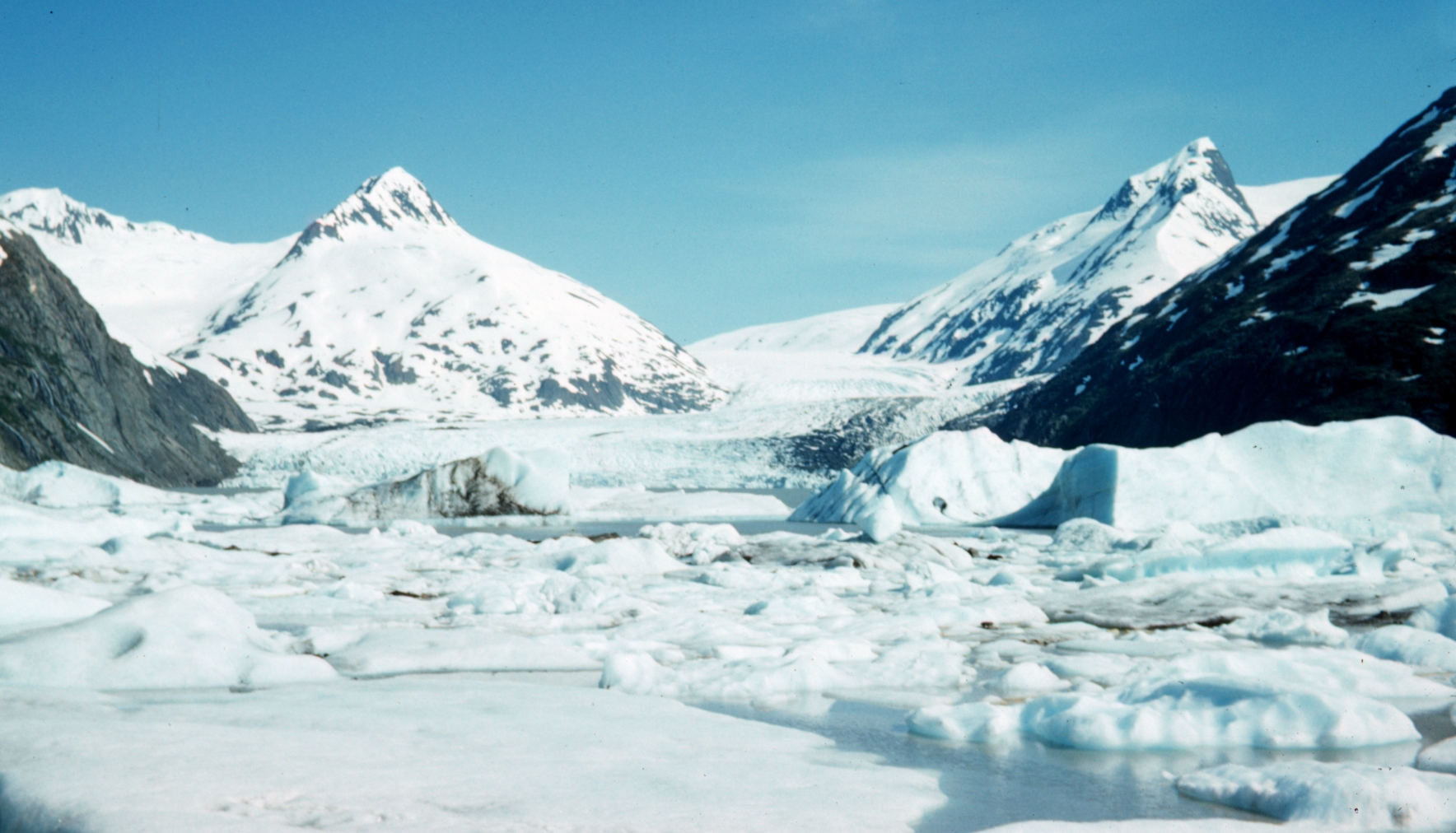 Portage Glacier, Alaska, 1958